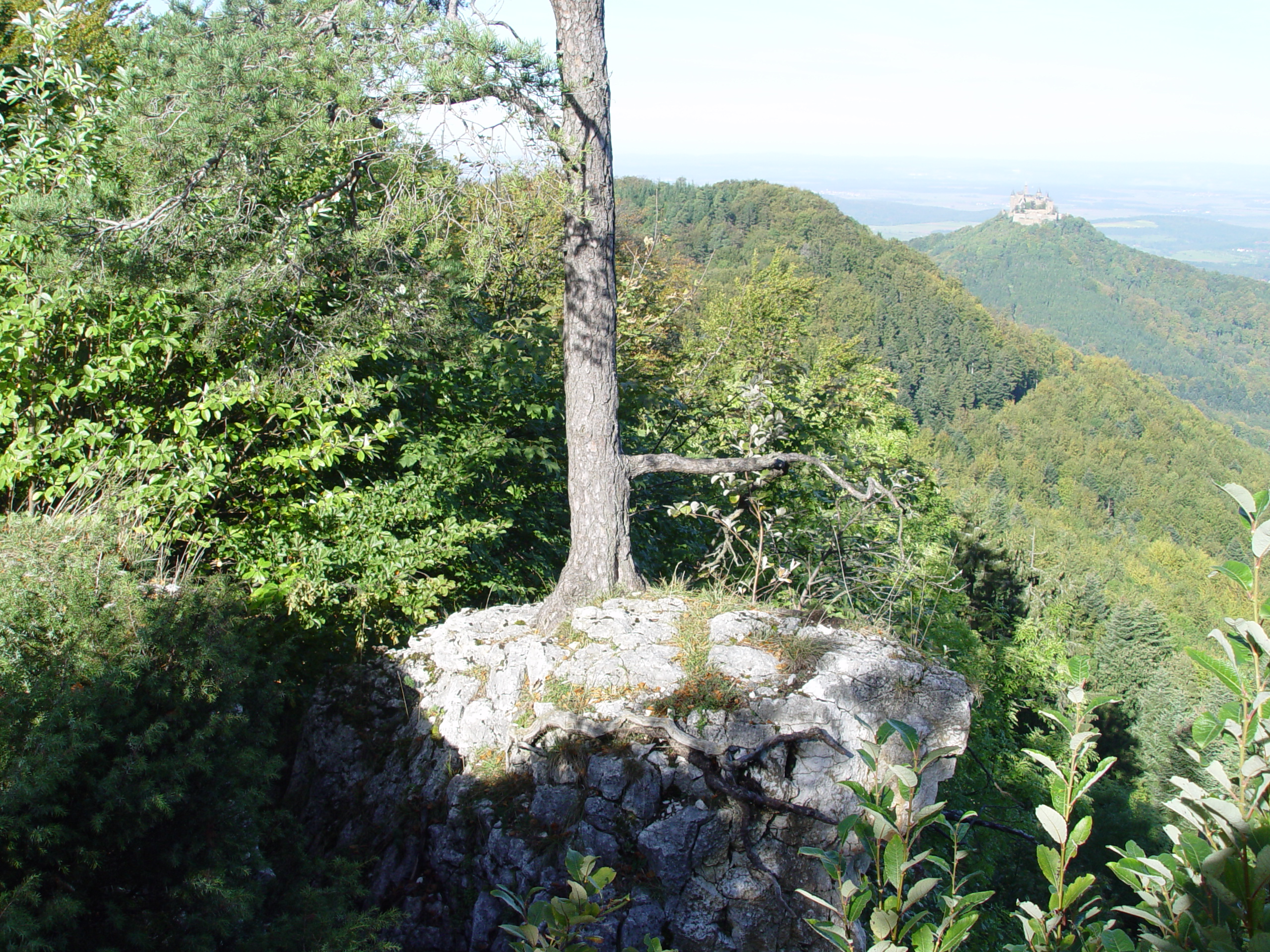 Burg Hohenzollern vom Albtrauf aus gesehen. own work - Bild selbst gemacht Photographed by: Zollernalb